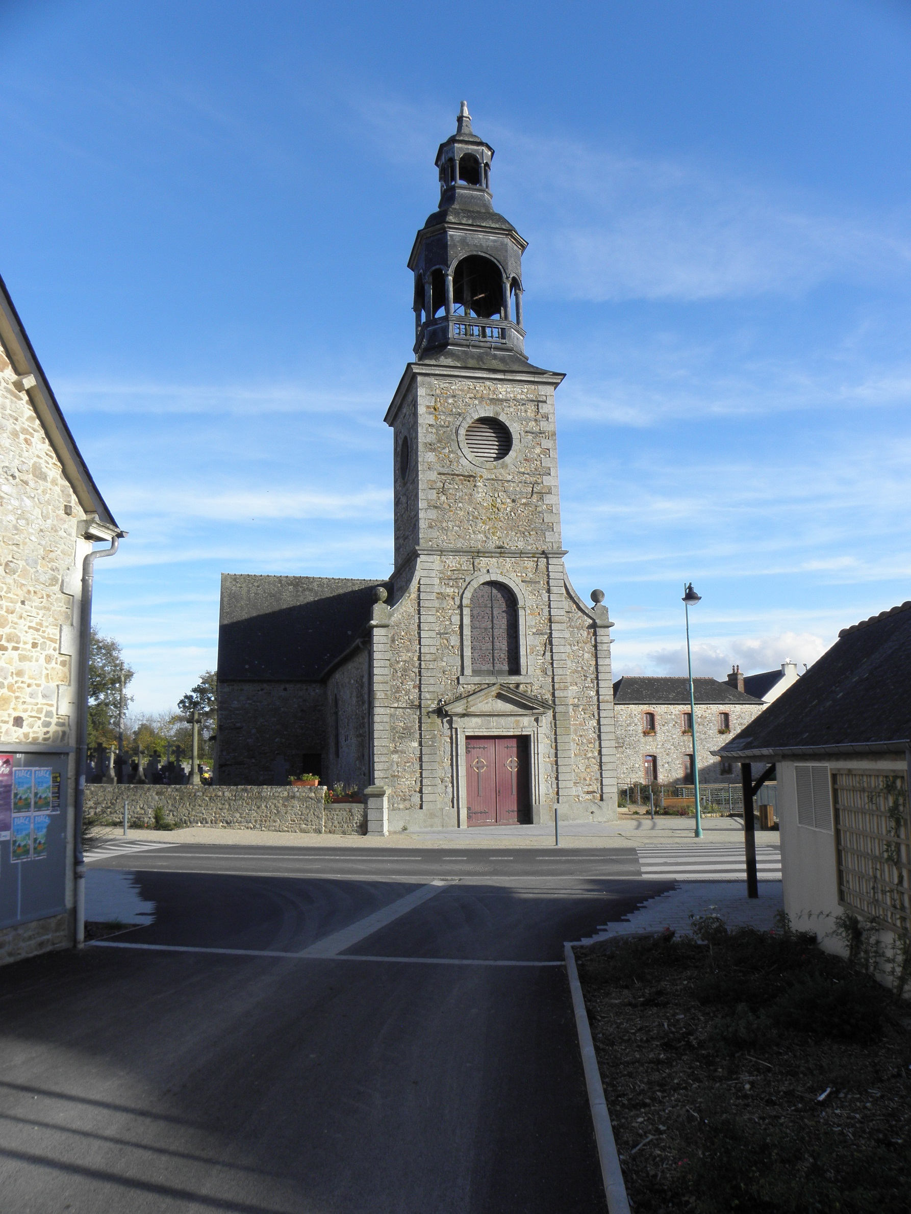 Église Saint-Pierre de Taillis (35). Façade occidentale.